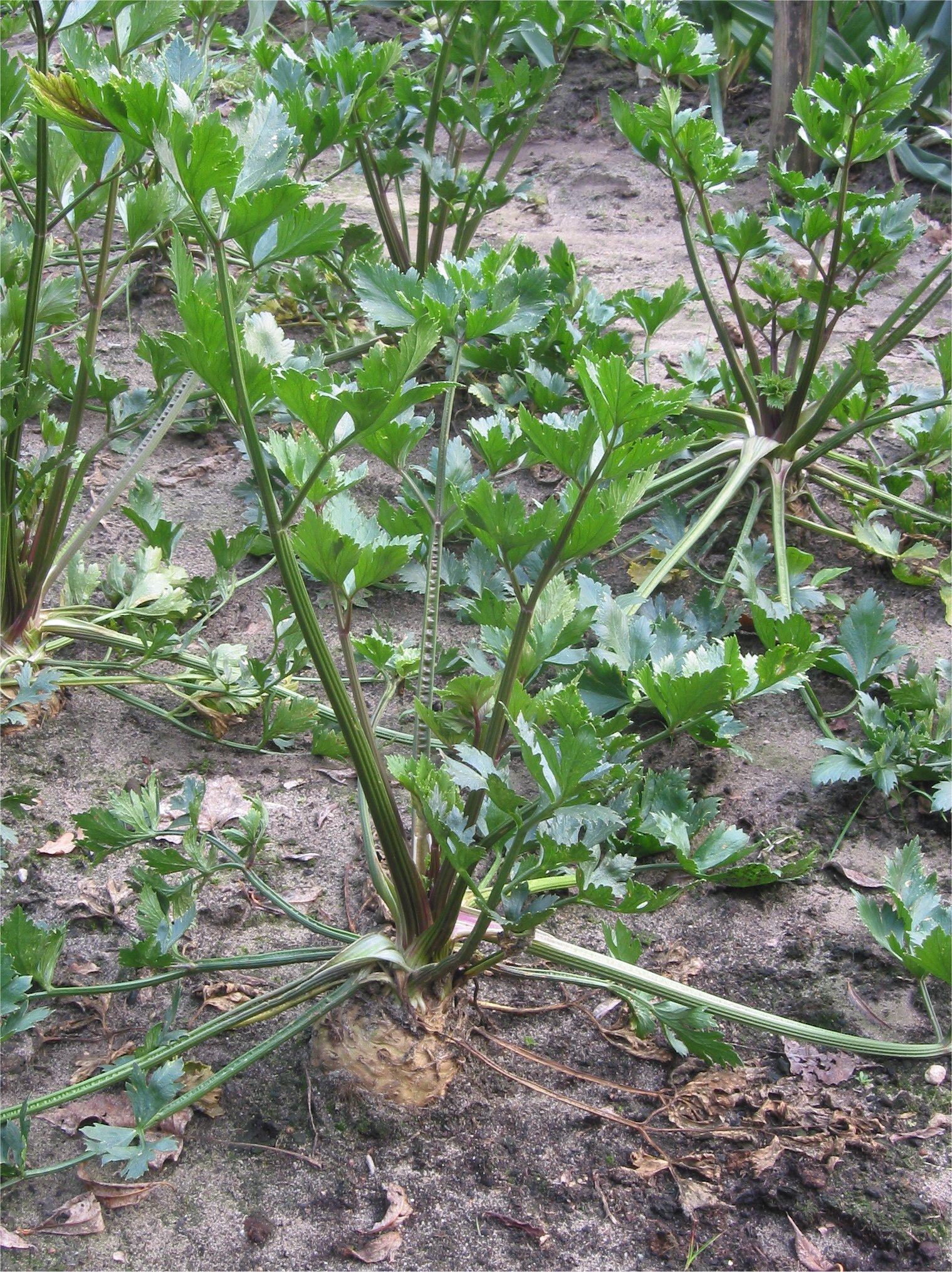 (nl: Knolselderij) Apium graveolens var. rapaceum 'Dolvi'